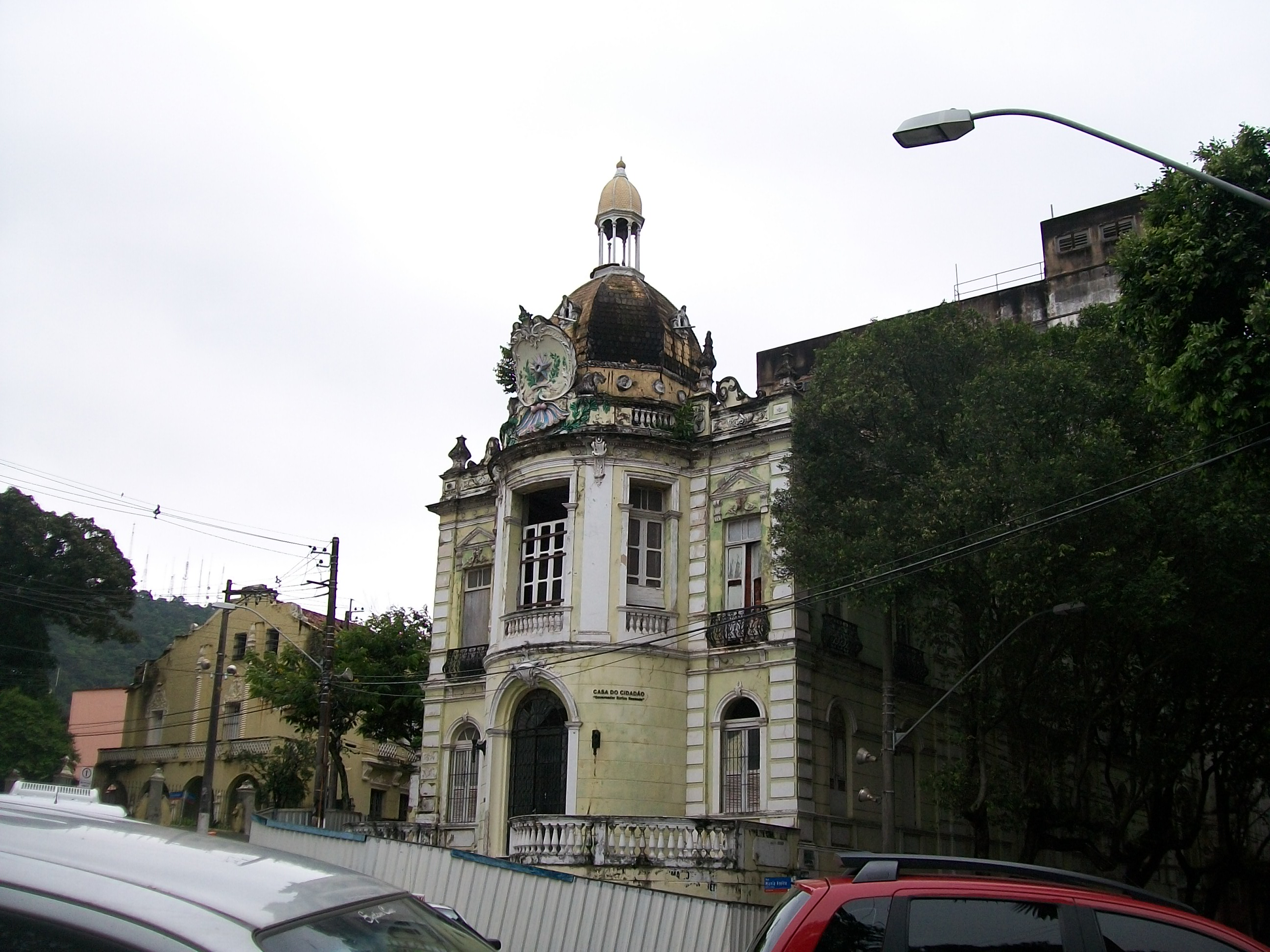 VITÓRIA - ES